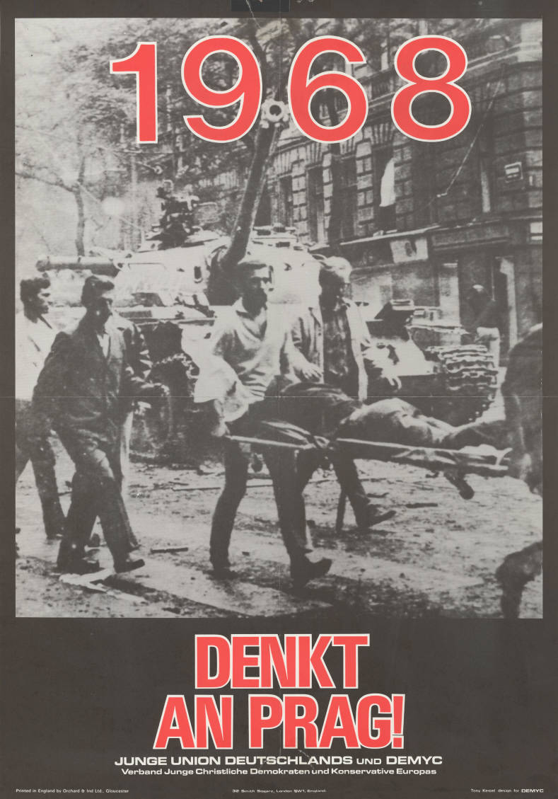 1968 Denkt an Prag! Junge Union Deutschlands und DEMYC Verband Junge Christliche Demokraten und Konservative EuropasAbbildung:Männer tragen einen Verletzten auf einer Bahre - dahinter sowjetischer Panzer (Foto)Kommentar:Vgl. Plakat Nr. 10-028-3042Plakatart:Motiv-/TextplakatKünstler_Grafiker:Tony Kerpel design for DEMYCAuftraggeber:JU und DEMYCDrucker_Druckart_Druckort:Printed in England by Orchard & Ind. Ltd., GloucesterObjekt-Signatur:10-028 : 11Bestand:Plakate von Jugendorganisationen der Parteien ( 10-028)GliederungBestand10-18:Plakate von Jugendorganisationen der Parteien (10-028) » CDU » Motiv- und TextplakateLizenz:KAS/ACDP 10-028 : 11 CC-BY-SA 3.0 DE